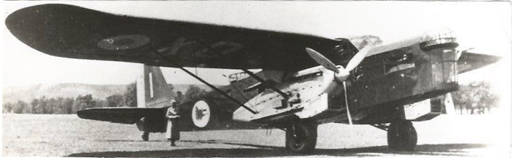 Oscar Jeanne De Leydet accanto ad un Potez... la foto è originale dell'epoca, ma è stata tagliata sopra e sotto... sull'aereo io ci leggerei 123 come numero di serie, ma non si vede bene...